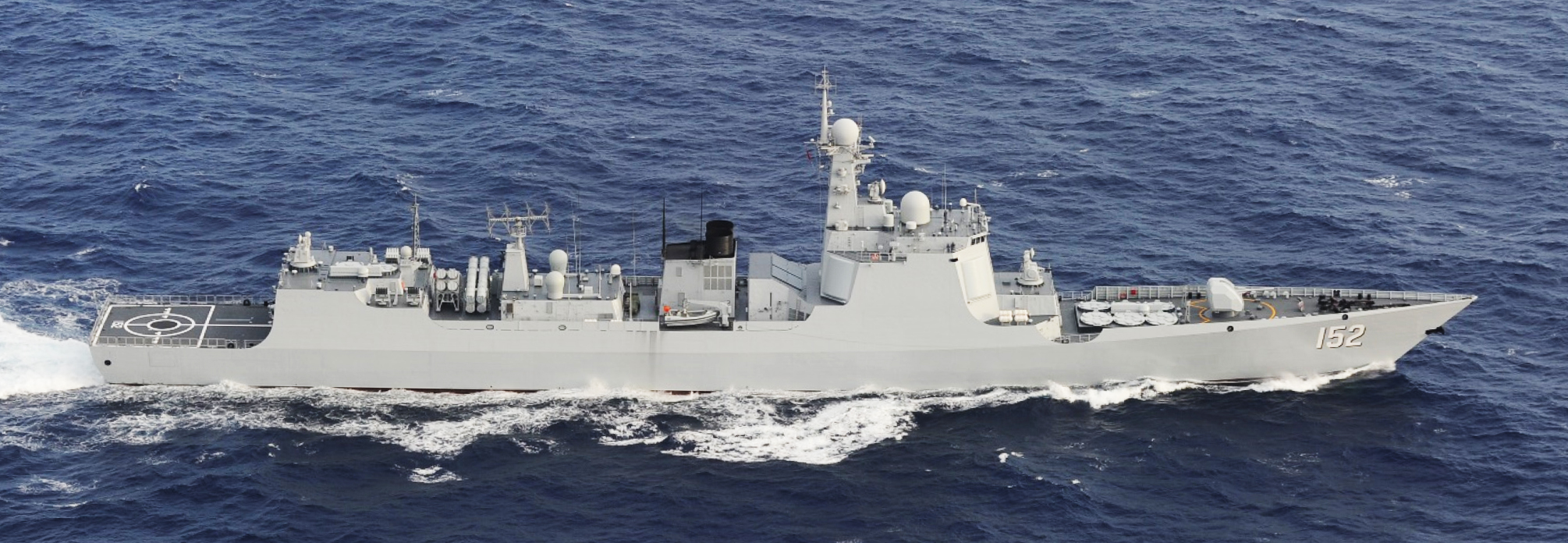 ４月２０日（金）午前１０時半頃、海上自衛隊第１３護衛隊所属「さわぎり」（佐世保）、第５護衛隊所属「あきづき」（佐世保）及び第５航空群所属Ｐ－３Ｃ（那覇）が、与那国島（沖縄県）の南約３５０ｋｍの海域を東進する中国海軍クズネツォフ級空母「遼寧」１隻、ルーヤンⅢ級ミサイル駆逐艦１隻、ルーヤンⅡ級ミサイル駆逐艦３隻、ジャンカイⅡ級フリゲート２隻の計７隻を確認した。 また、同日午前１１時頃、同海域でクズネツォフ級空母「遼寧」から複数の艦載戦闘機（推定）が飛行するのを確認した。 防衛省として、太平洋上においてクズネツォフ級空母「遼寧」から艦載戦闘機（推定）が飛行するのを確認したのは、今回が初めてである。